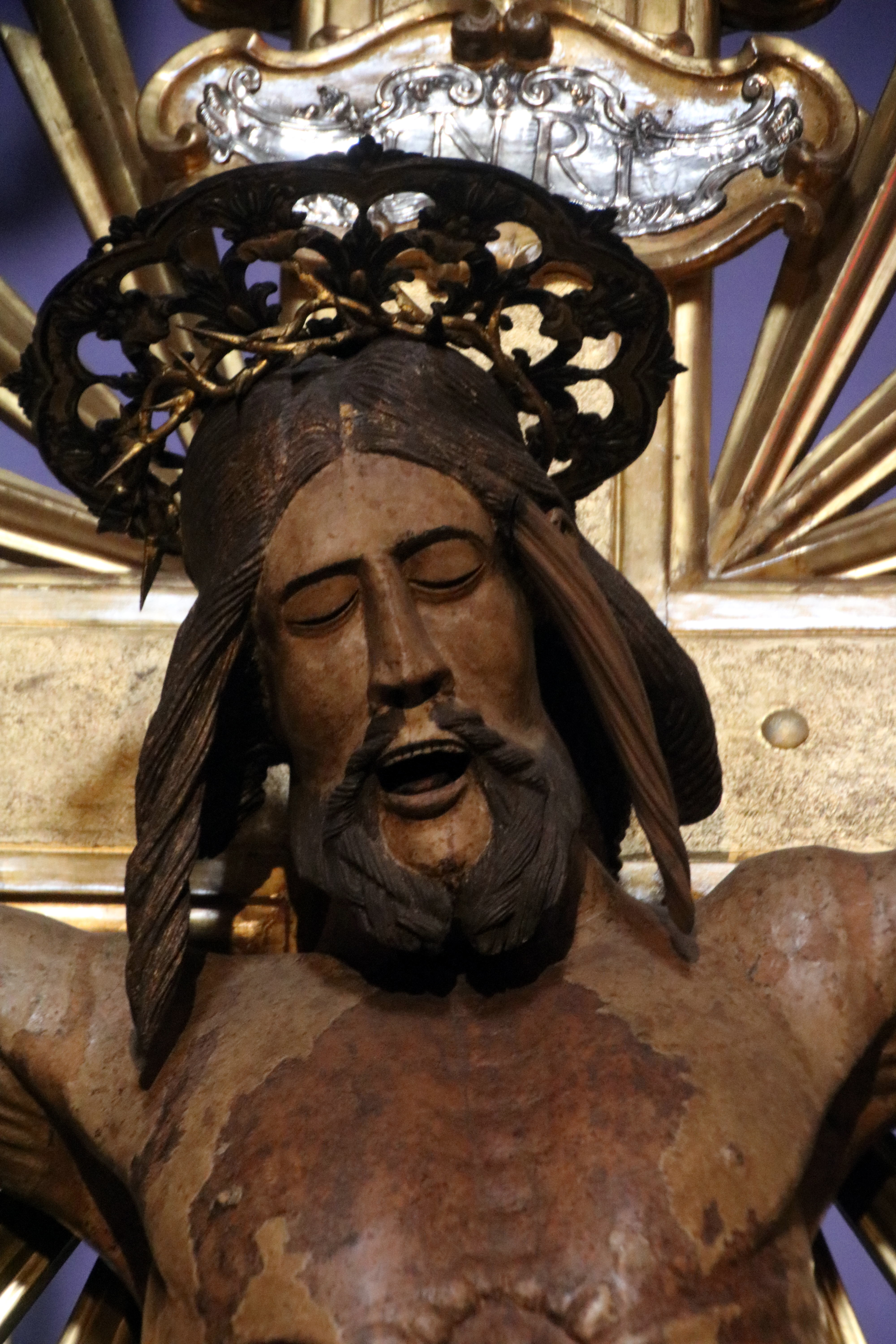 Crocifisso, Pieve di Cento, Collegiata di Santa Maria Maggiore